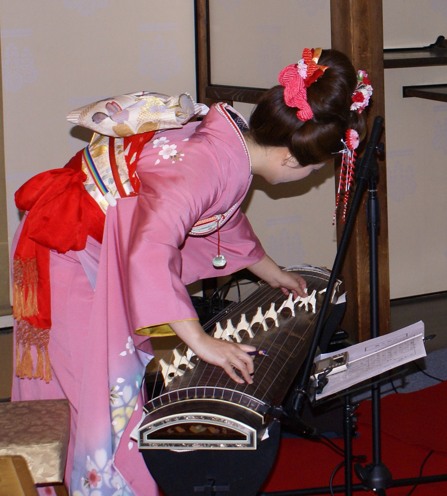 Joueuse de koto réglant son instrument.